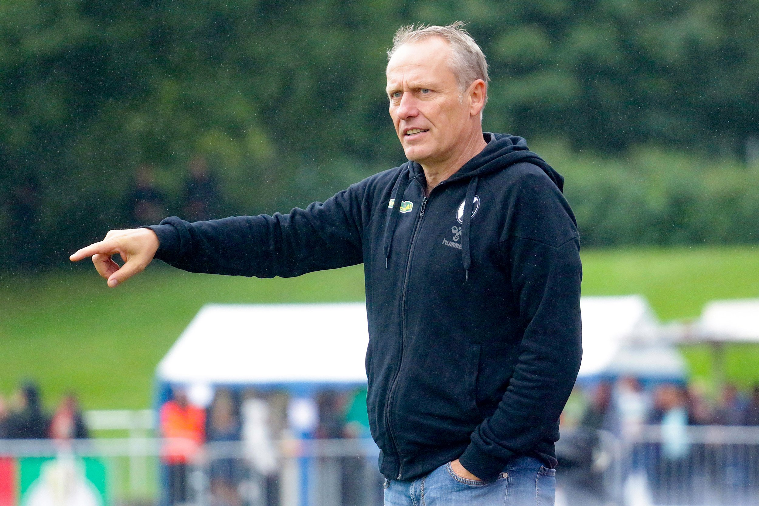 Christian Streich beim DFB-Pokalspiel VfB Germania Halberstadt vs. SC Freiburg